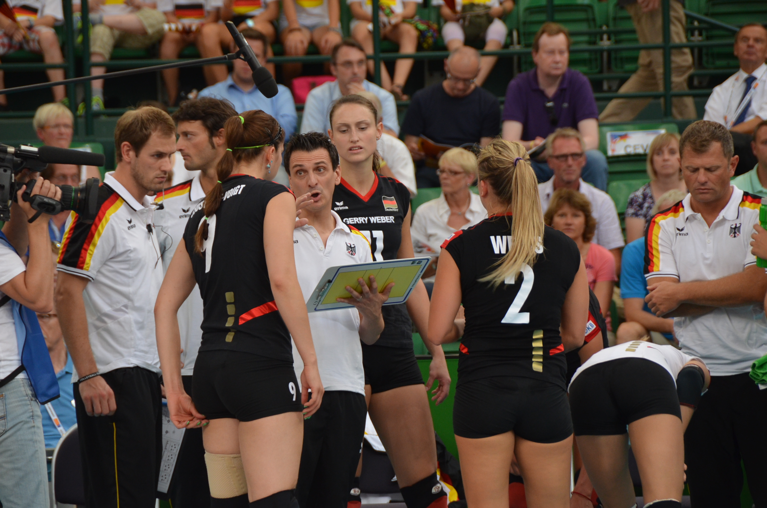 Volleyball-Europameisterschaft der Frauen 2013-Spielort Halle (Westf) Gerry-Weber-Stadion - Spiel 6. September 2013 (Deutschland-Spanien)